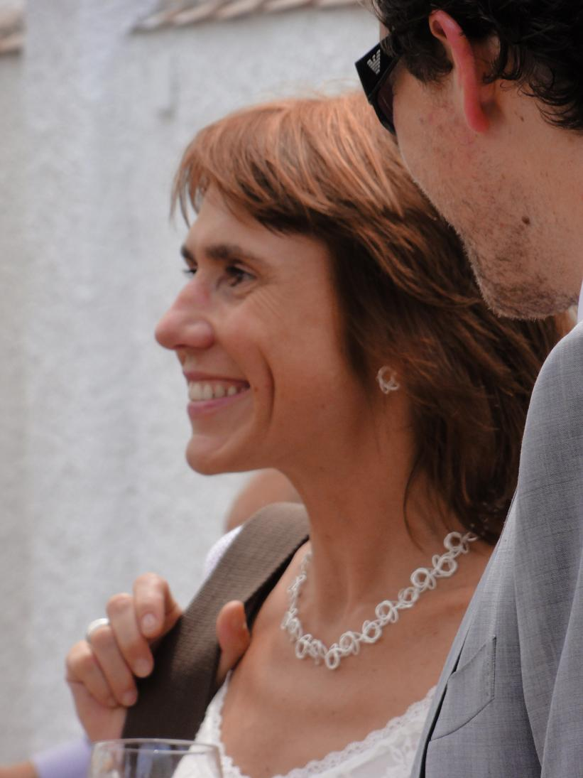 Duits schaatser